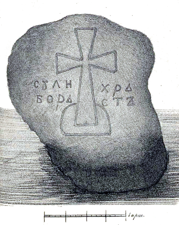 Двинской или Борисов камень 4-й.